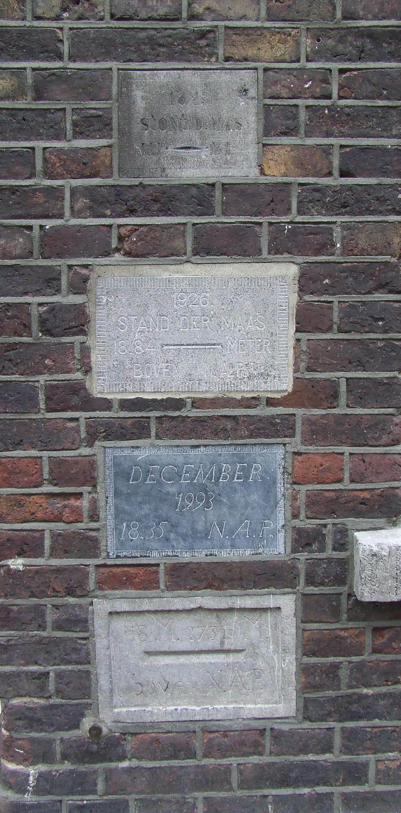 Meuse flood level signs in Venlo, floods of 1643, 1926, 1993 and unknown (possibly 1789).